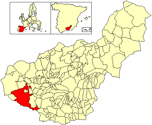 Situación del término municipal de Alhama de Granada respecto a la provincia de Granada, en España.